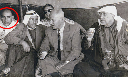 1956 - מפגש במגזר הבדווי עם בכור שטרית